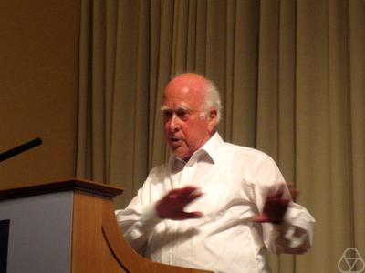 Peter Higgs (* 1929)